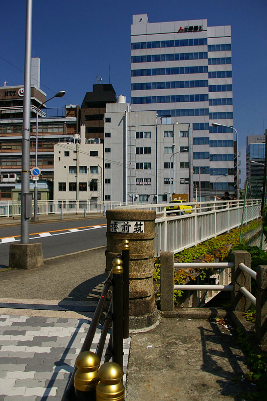 Tikuzen-Bashi (bridge), Osaka City, Japan.